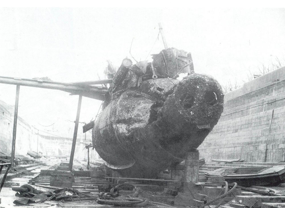 K.u.K. U-12 mit starkern BEschädigungen am Bug im Dock in Venedig, kurz vor der Verschrottung